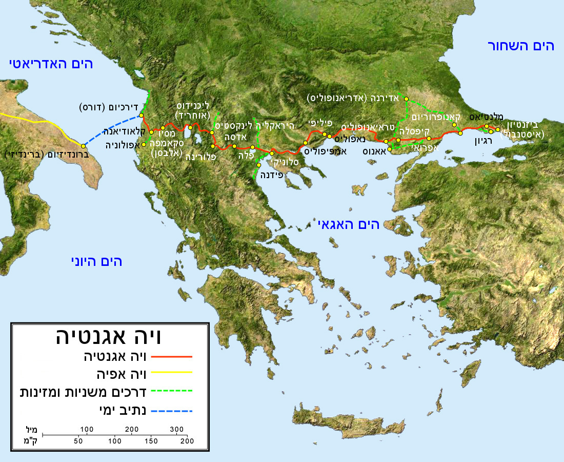 Via Egnatia